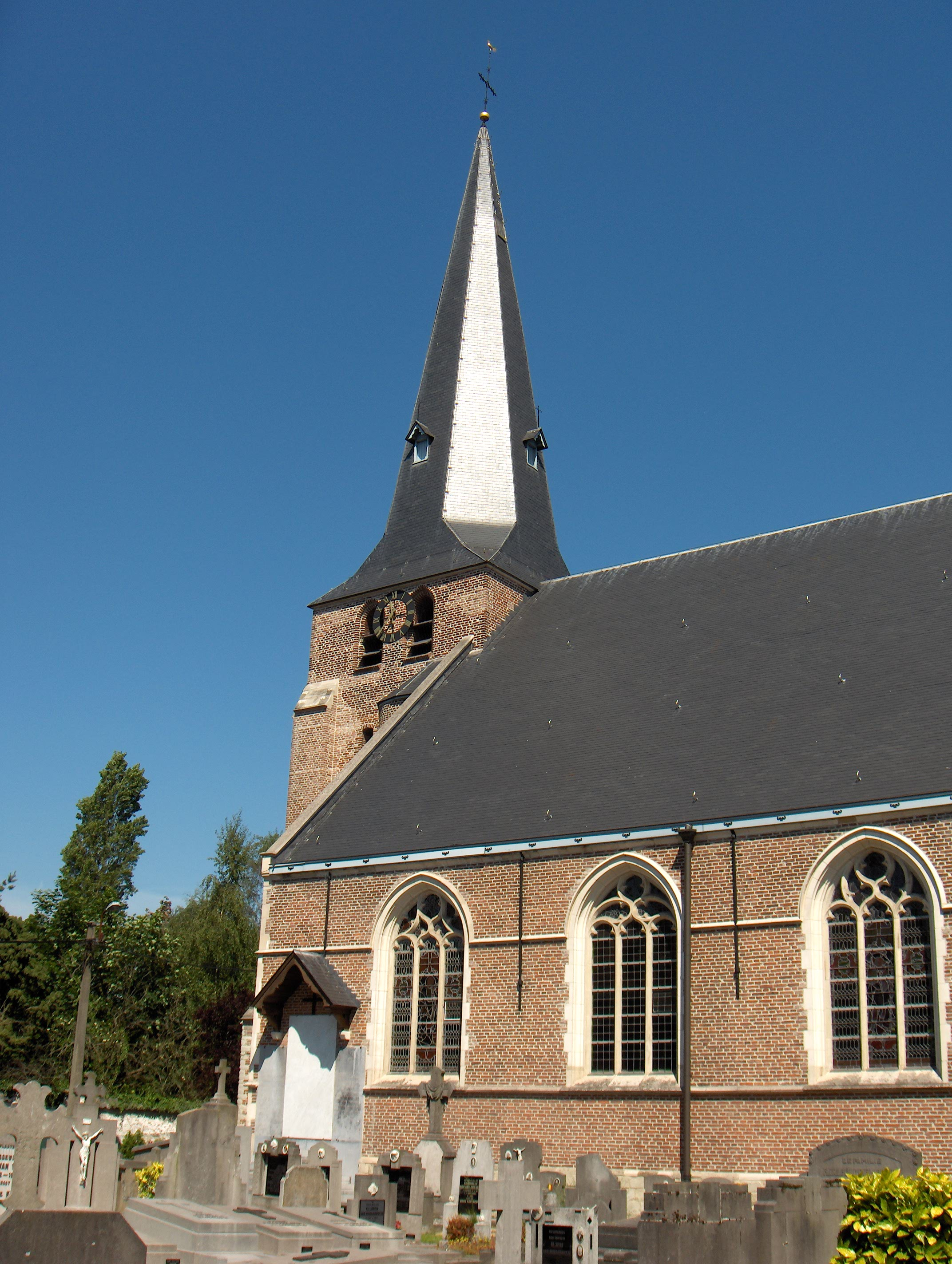 Gent, Ortsteil Sint-Kruis-Winkel (Belgien, Prov. Ostflandern), Kreuz-Christi-Kirche (Heilig Kruiskerk).